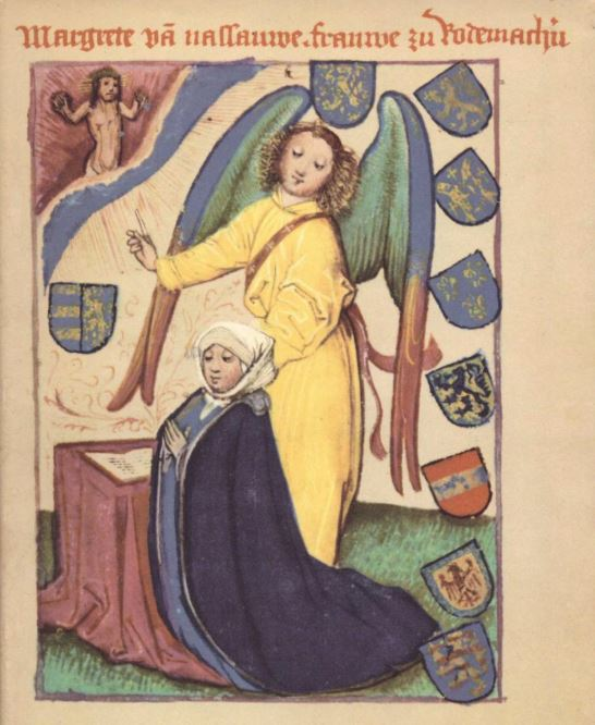 Gebetbuch der Margarete von Rodemachern. Weimar HAAB Q 59